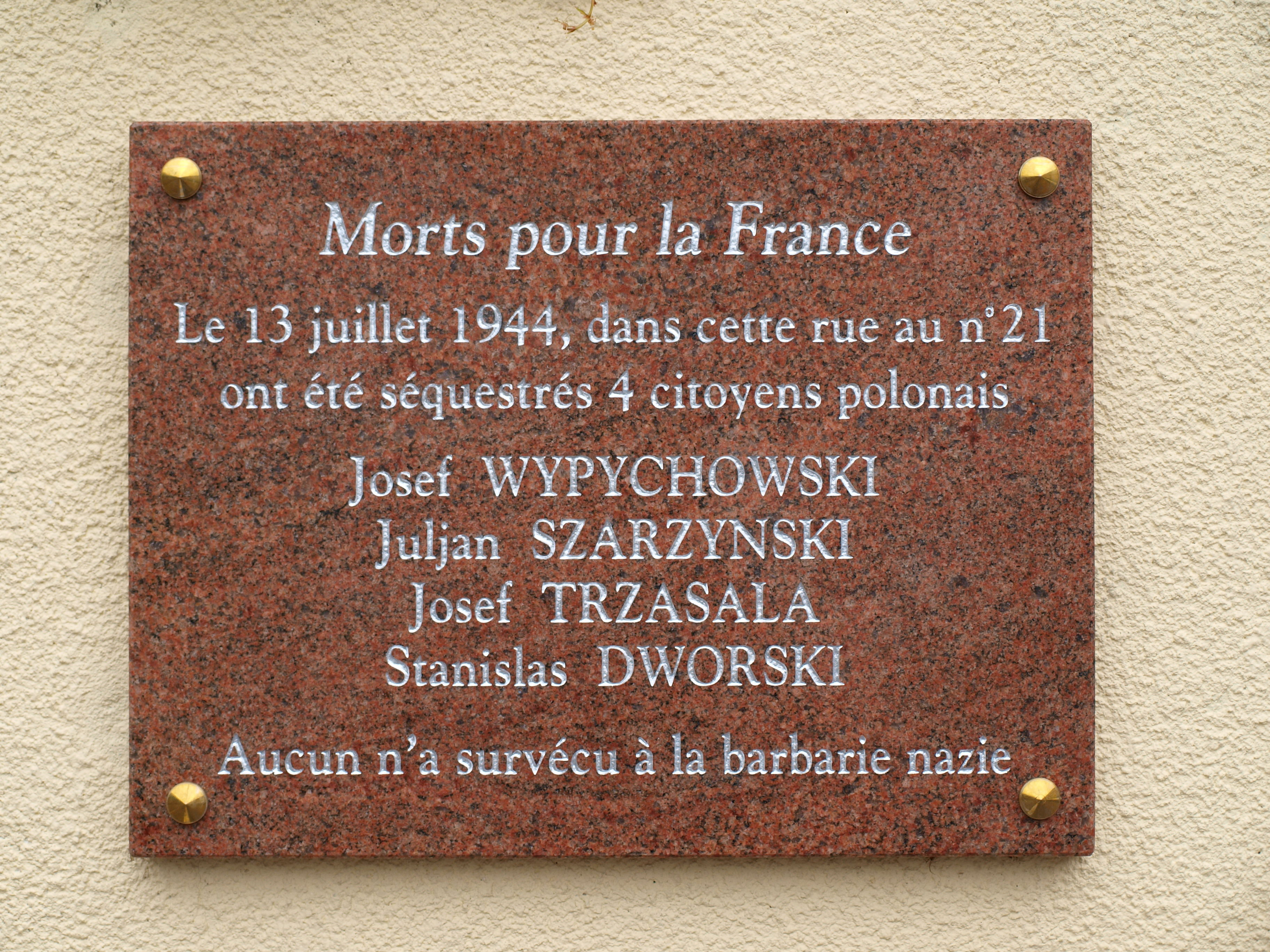 Malay-le-Grand (Yonne, France) ; mémorial aux résistants polonais. La légende indique : Morts pour la France - Le 13 juillet 1944, dans cette rue, au n° 21, ont été séquestrés 4 citoyens polonais: Josef WYPYCHOWSKI, Juljan SZARZYNSKI, Josef TRZASALA, Stanislas DWORSKI.Aucun n'a survécu à la barbarie nazie.